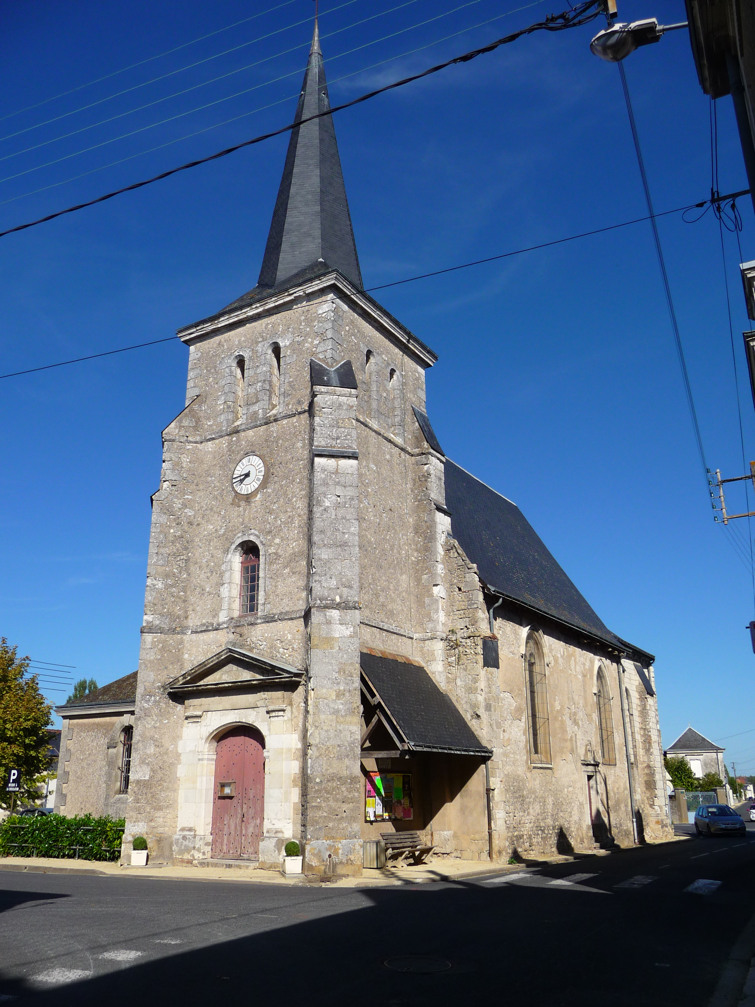 Église Saint Quentin - Channay sur Lathan